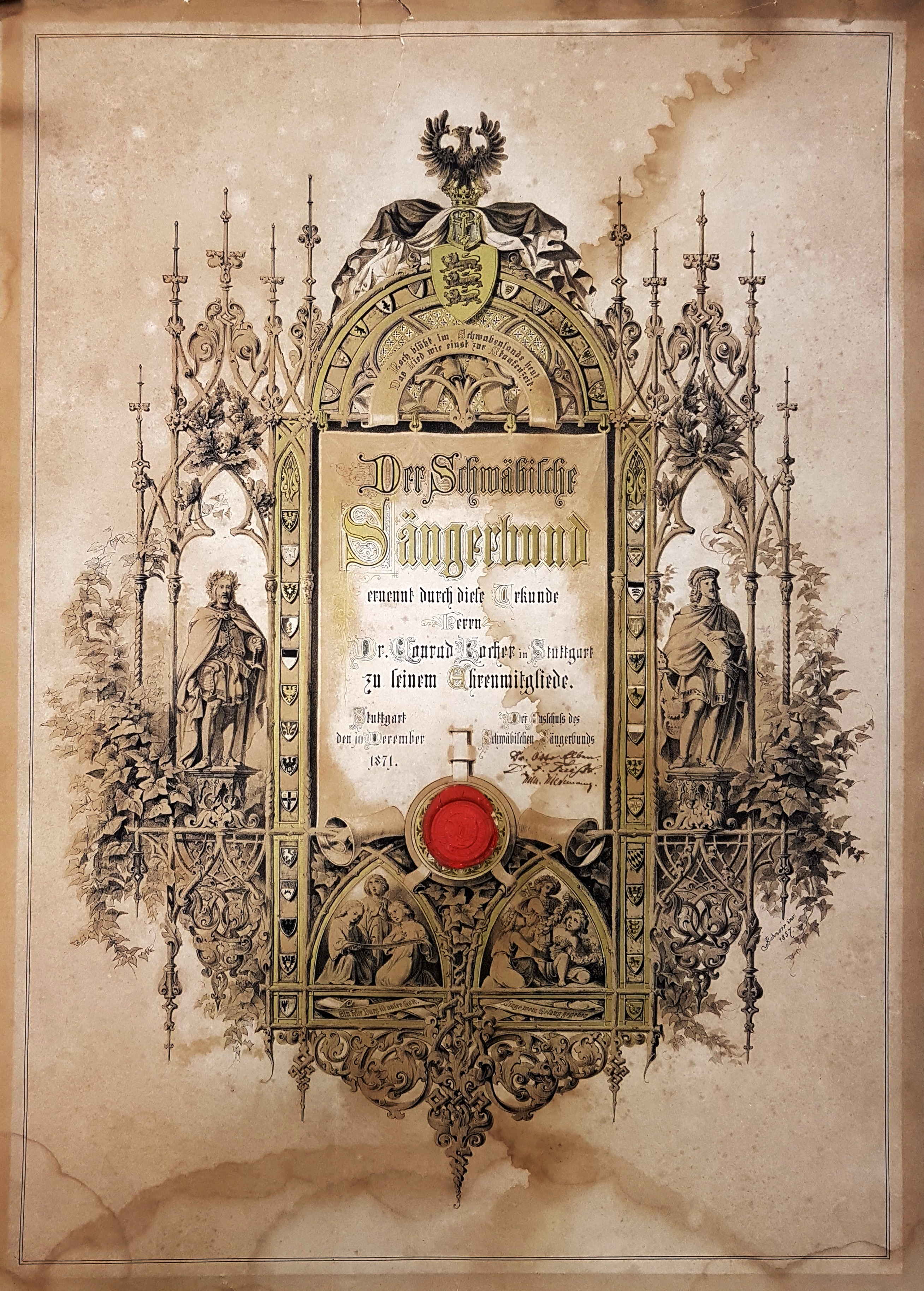 Urkunde zur Verleihung der Ehrenmitgliedschaft des Schwäbischen Sängerbundes an Konrad Kocher.